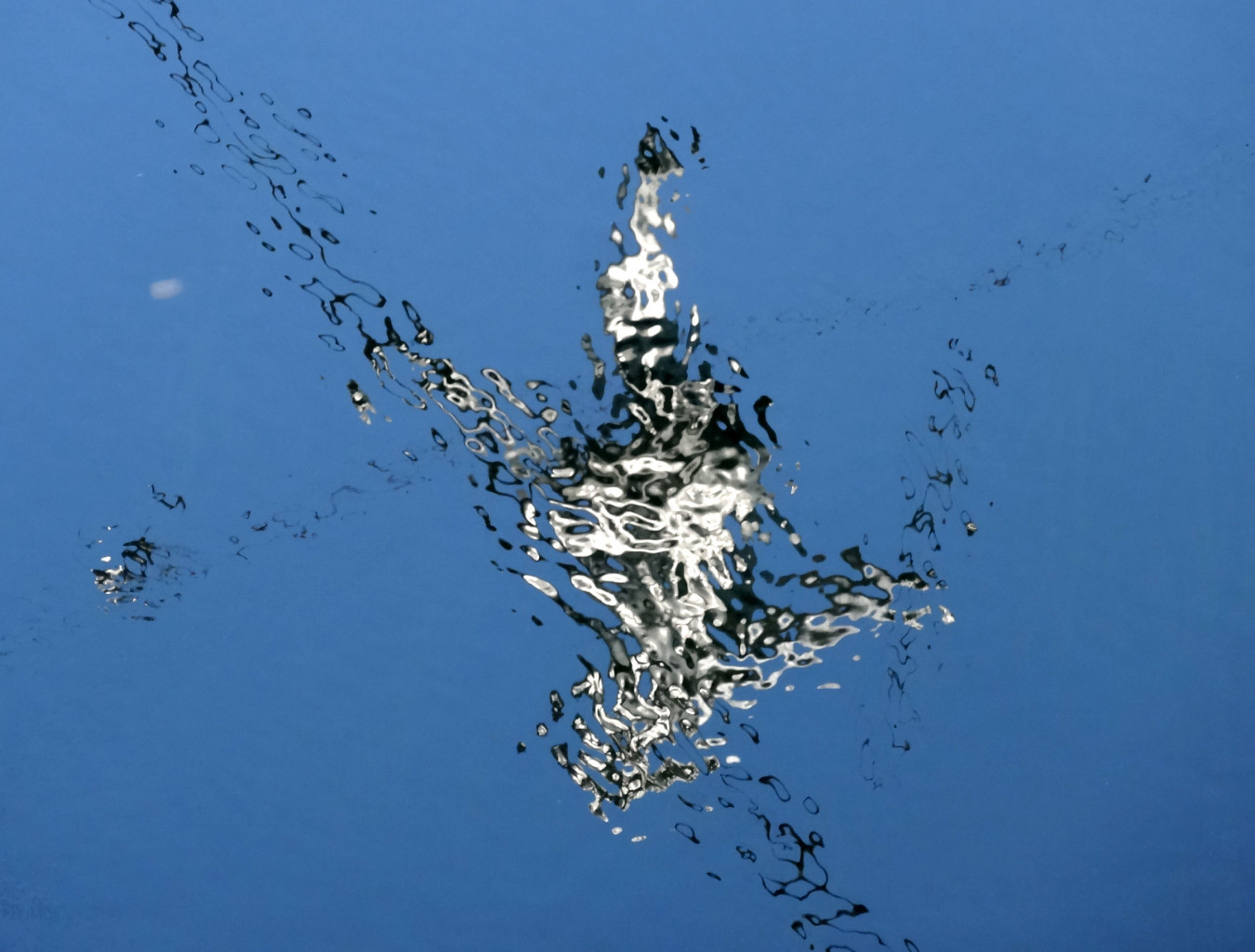 Rzeźba Jerzego Kędziory "Przechodzący przez rzekę" (2004) zawieszona nad Brdą w Bydgoszczy